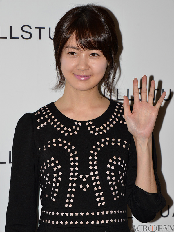 이요원, LG패션 질스튜어트 2013 S/S 컬렉션 행사에서